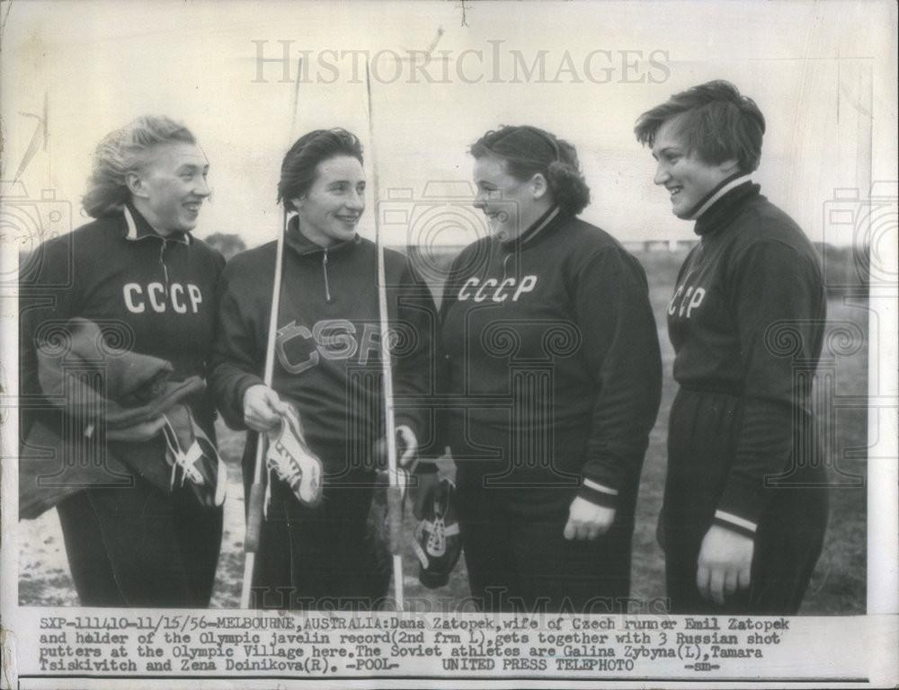 1956 PRESS PHOTO DANA ZATOPEK WIFE CZECH RUNNER EMIL ZATOPEK OLYMPIC JAVELIN